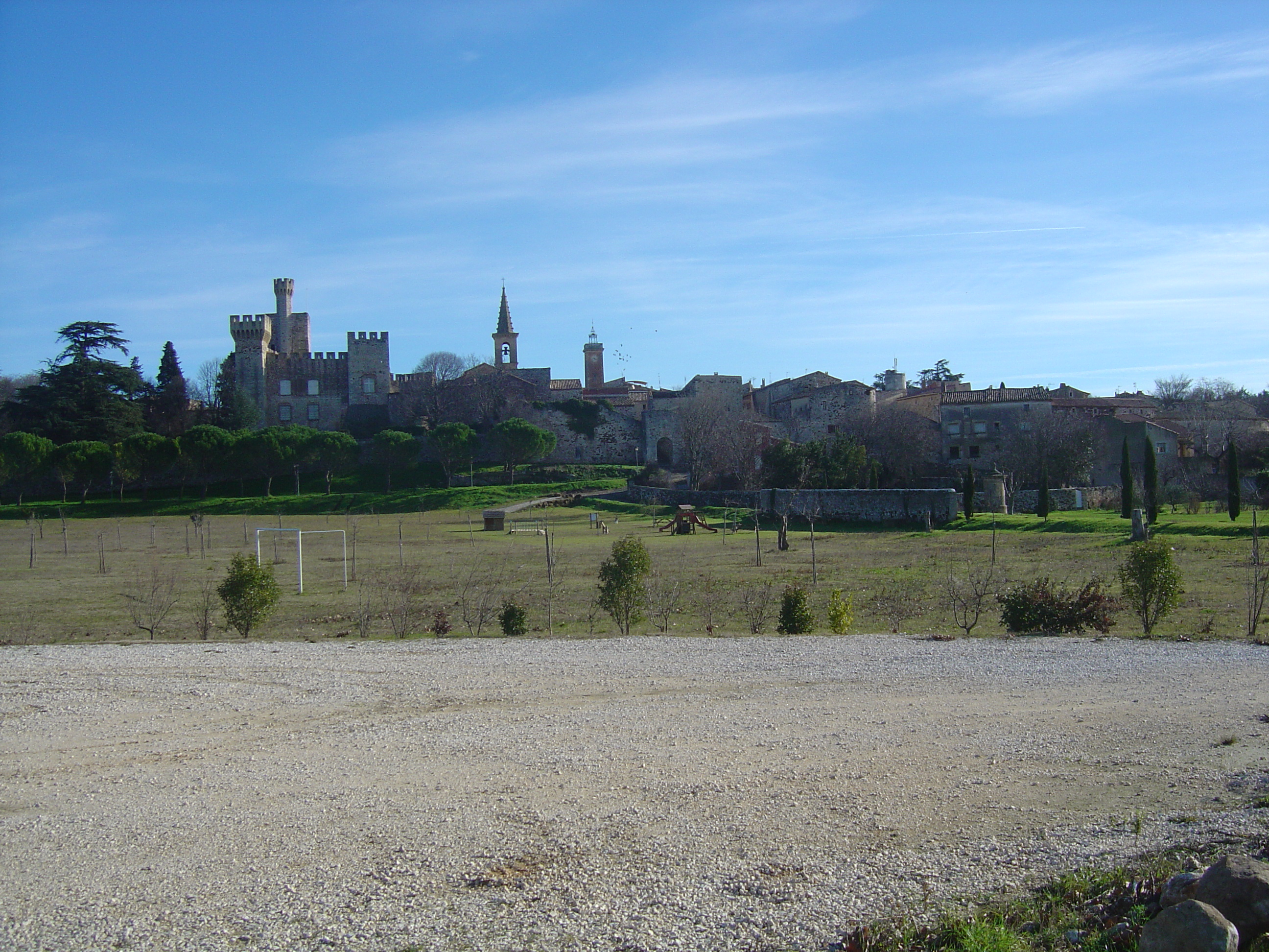 Village de Pouzilhac (30) et son château vu du bas du village